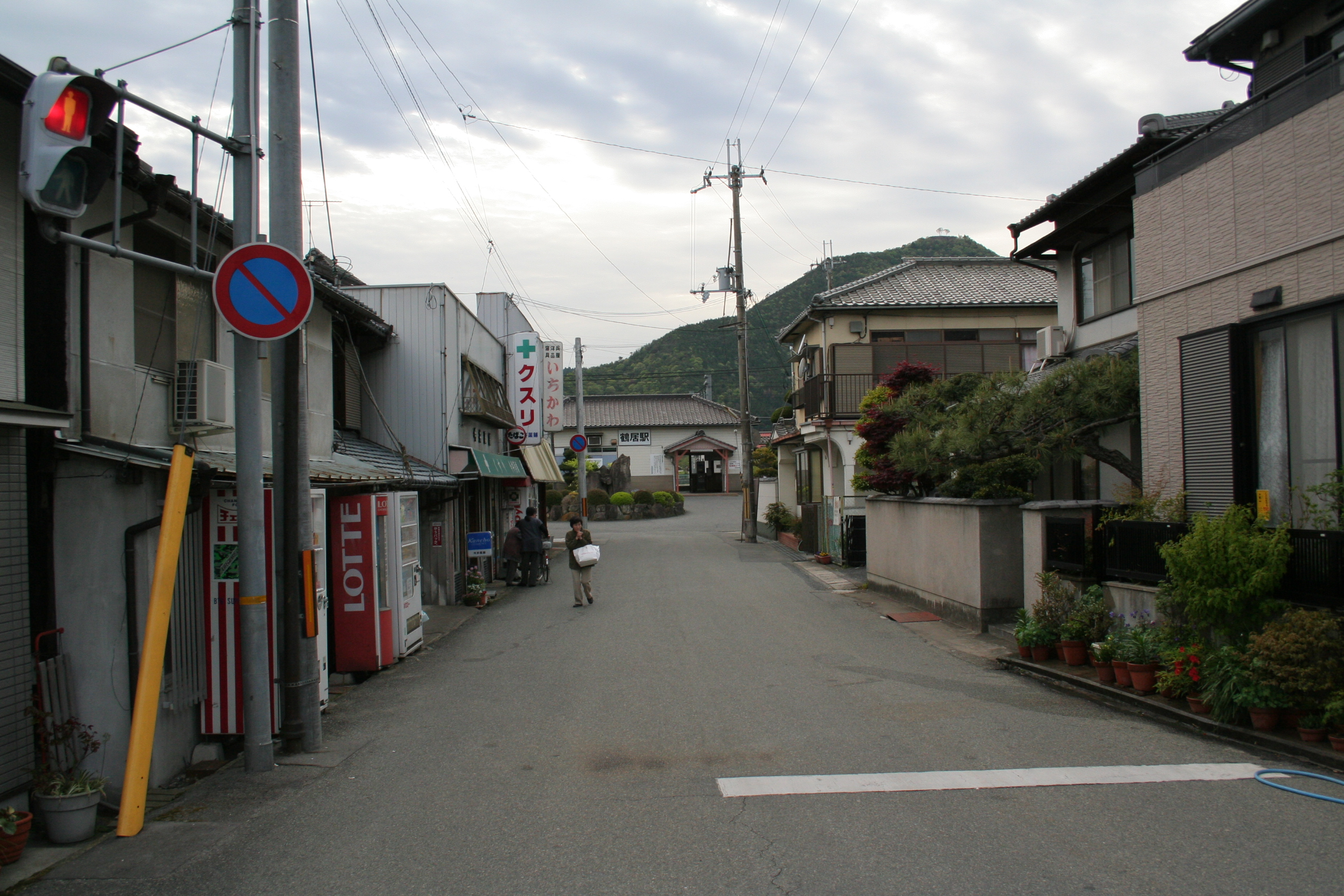 鶴居駅。JR西日本の鉄道路線の一つ、播但線にある鉄道駅。 駅前の通り。駅方向へ向けて撮影。